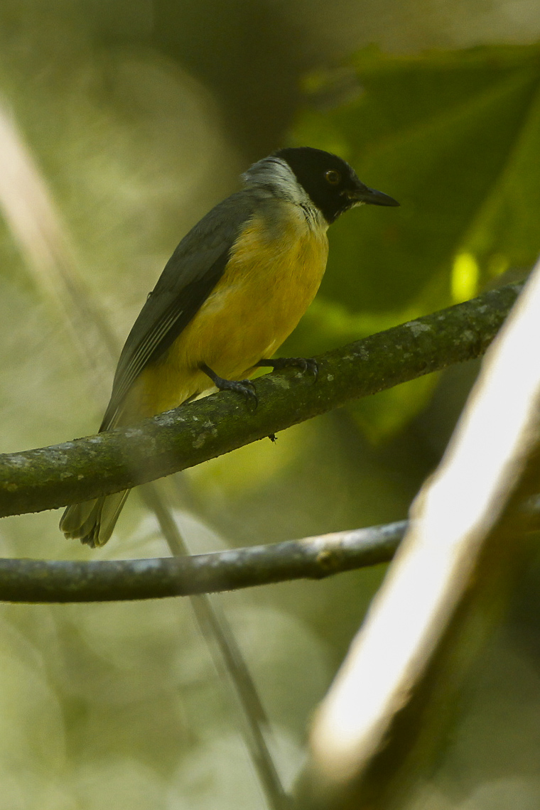 Tylas Vanga - Ranomafana - Madagascar_S4E8144